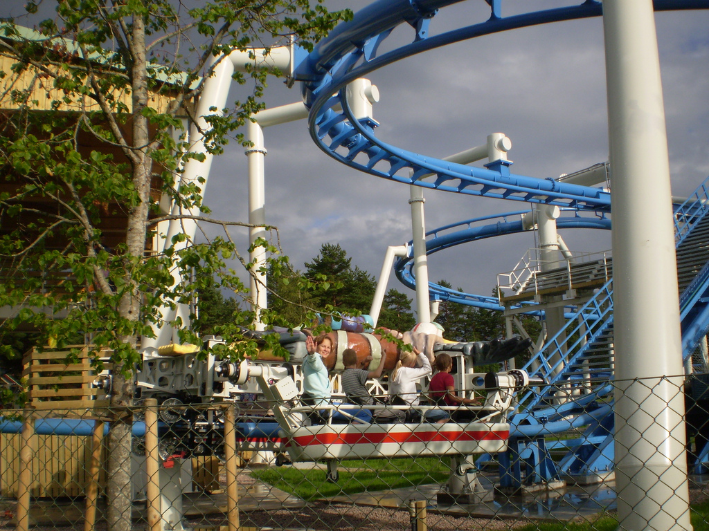 at Skara Sommarland